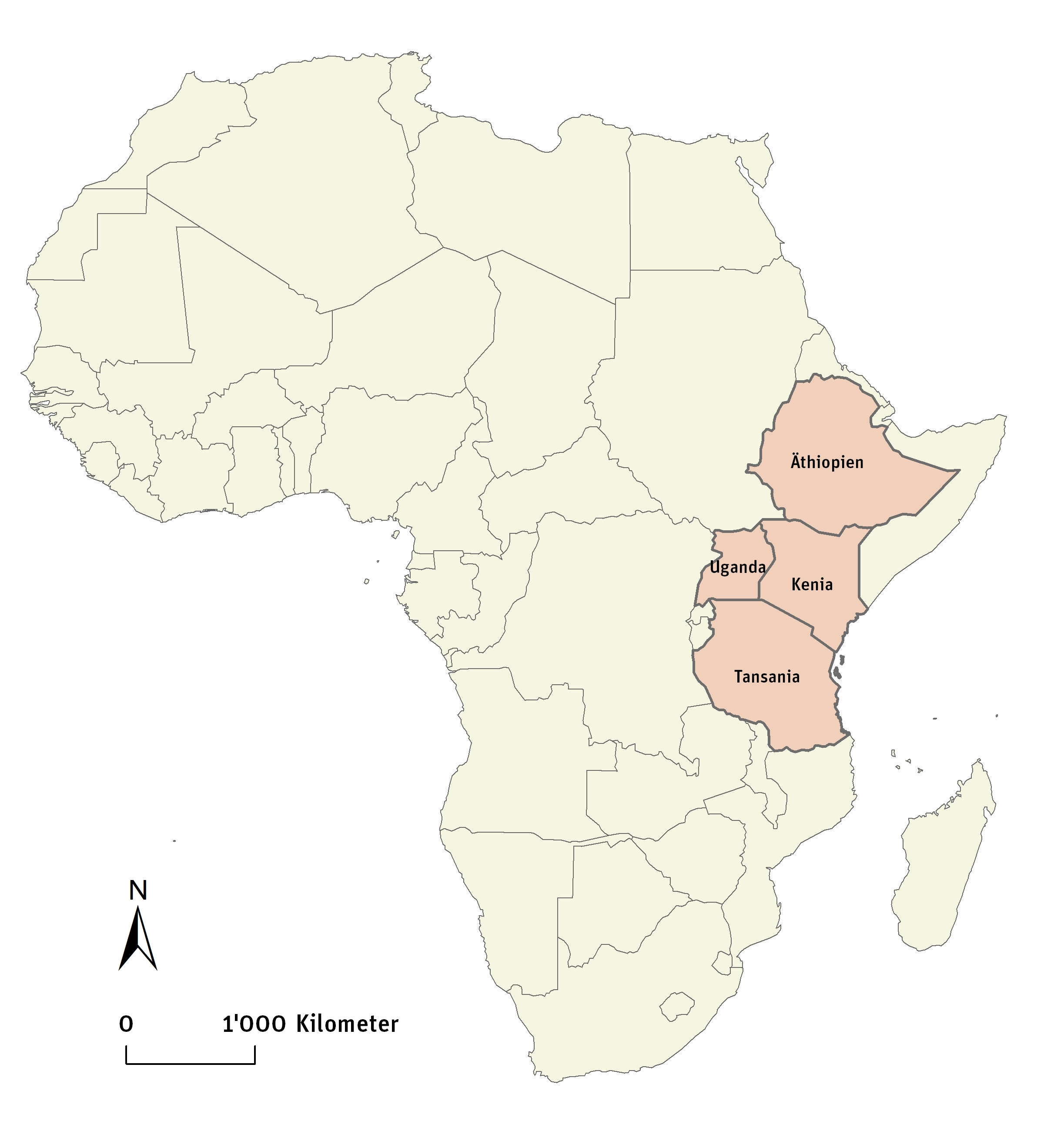 Biovision Schwerpunkt Länder Athiopien, Uganda, Kenia, Tansania